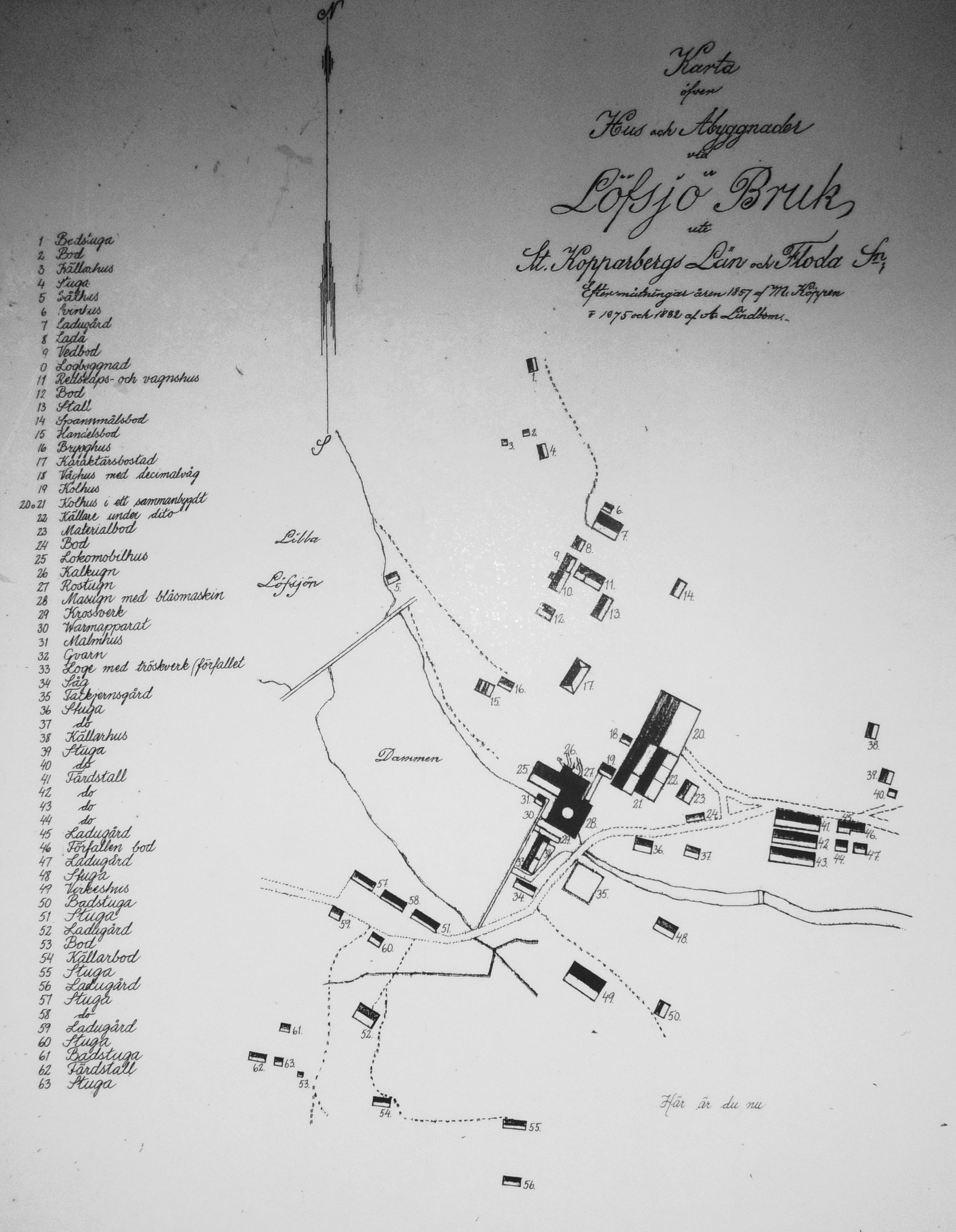 Karta öfver Hus och Åbyggnader uti Lövsjö Bruk...